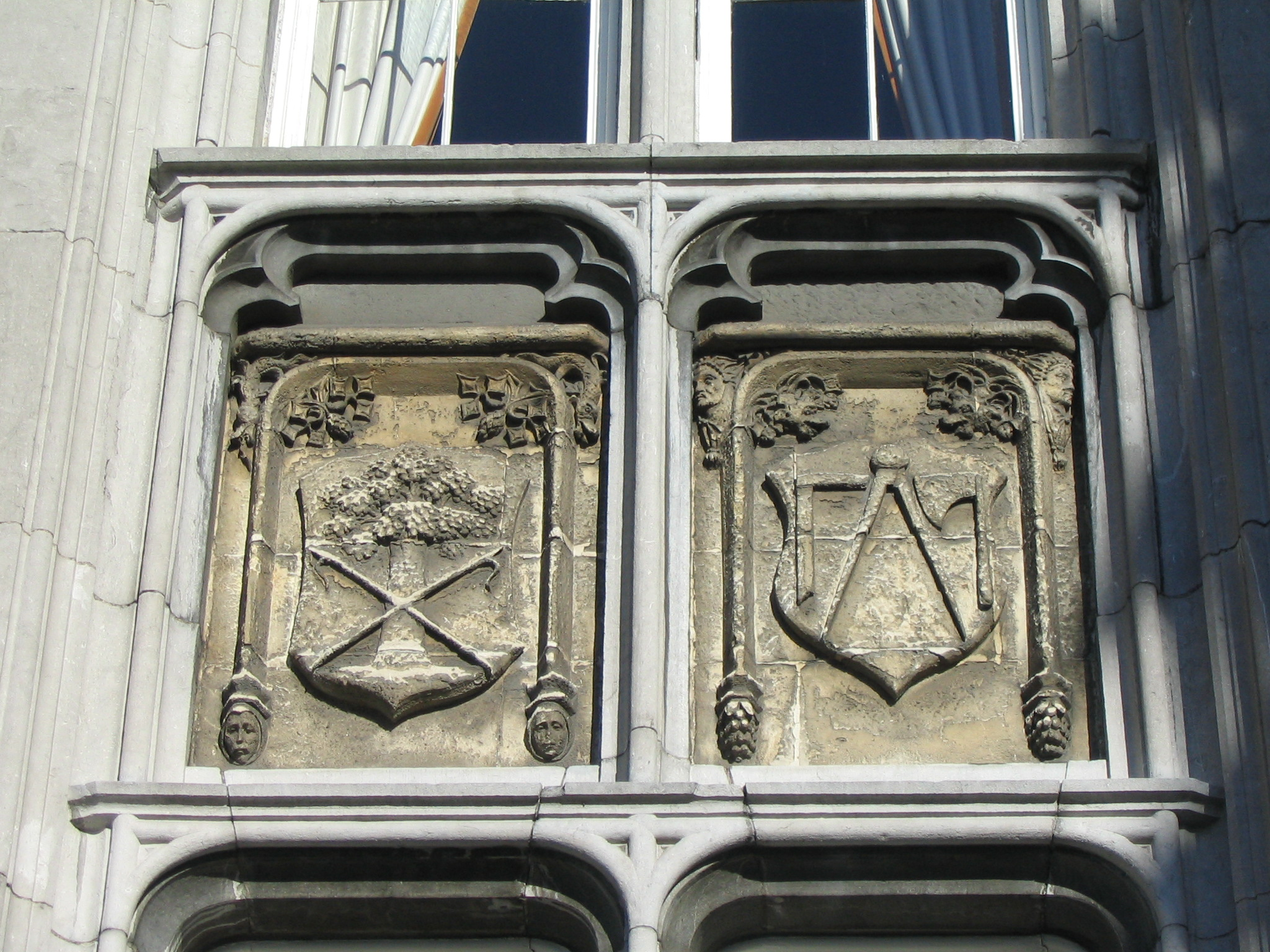 Panneau représentant deux des Trente-deux métiers de Liège sur la façade néogothique du Palais des Princes-Évêques de Liège : les 'mairniers' et les charpentiers.